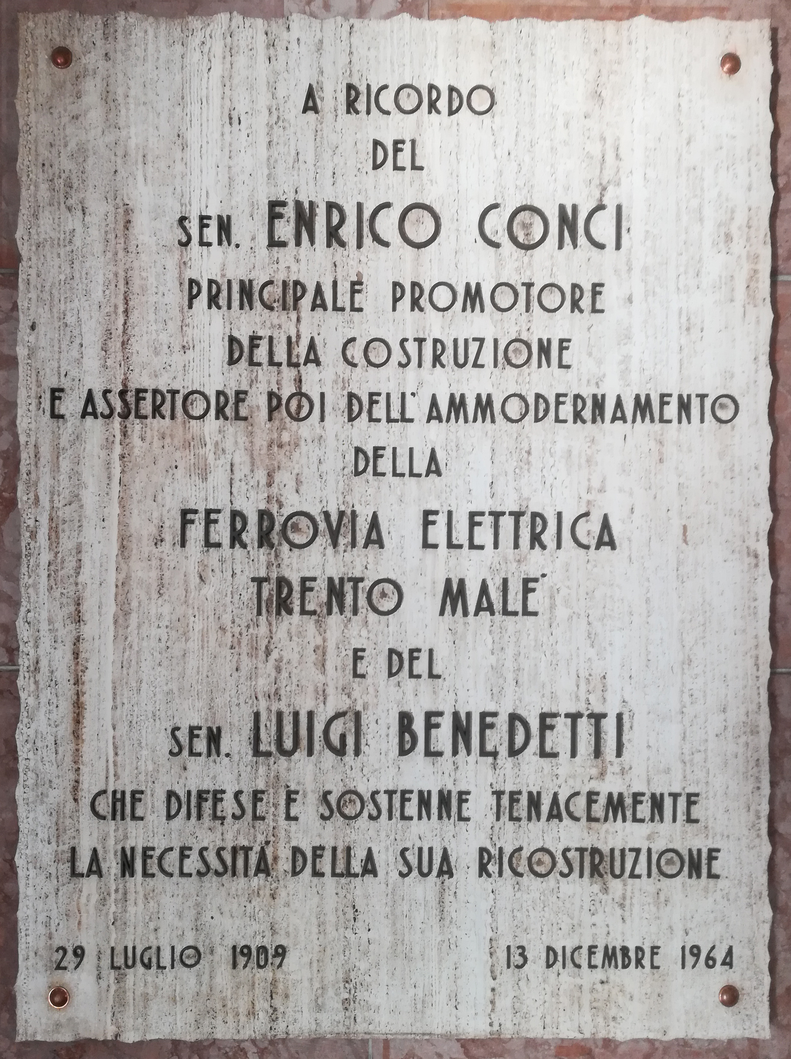 Targa commemorativa a Enrico Conci e Luigi Benedetti presso la stazione di Trento (ferrovia Trento-Malè).